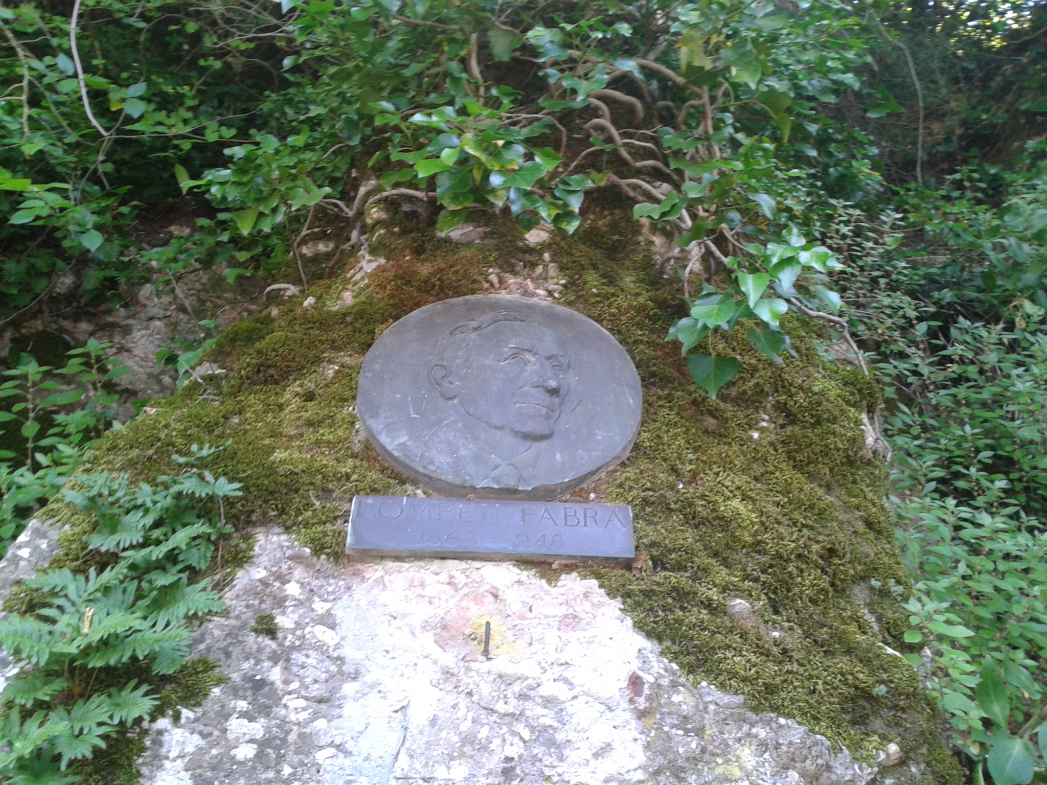 Camí dels degotalls (Montserrat)